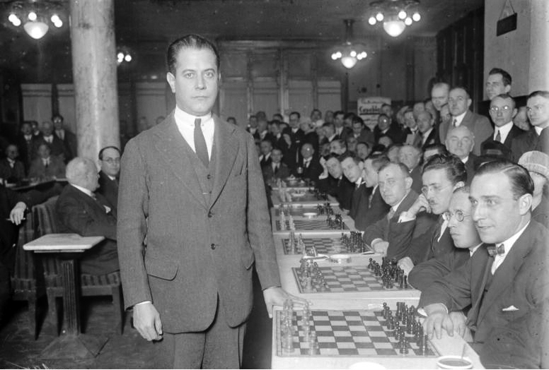 Capablanca, der Schach-Exweltmeister ist in Berlin eingetroffen, um eine grosse Simultan-Vorstellung an 30 Brettern zu geben. Capablanca, der berühmte Ex-Schachweltmeister in Berlin.